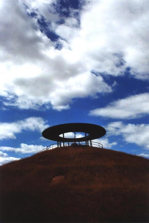 Het Lilienthal monument 2006